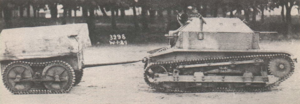 Pierwszy tym przyczepki dla czołgu TK [opis oryginalny]